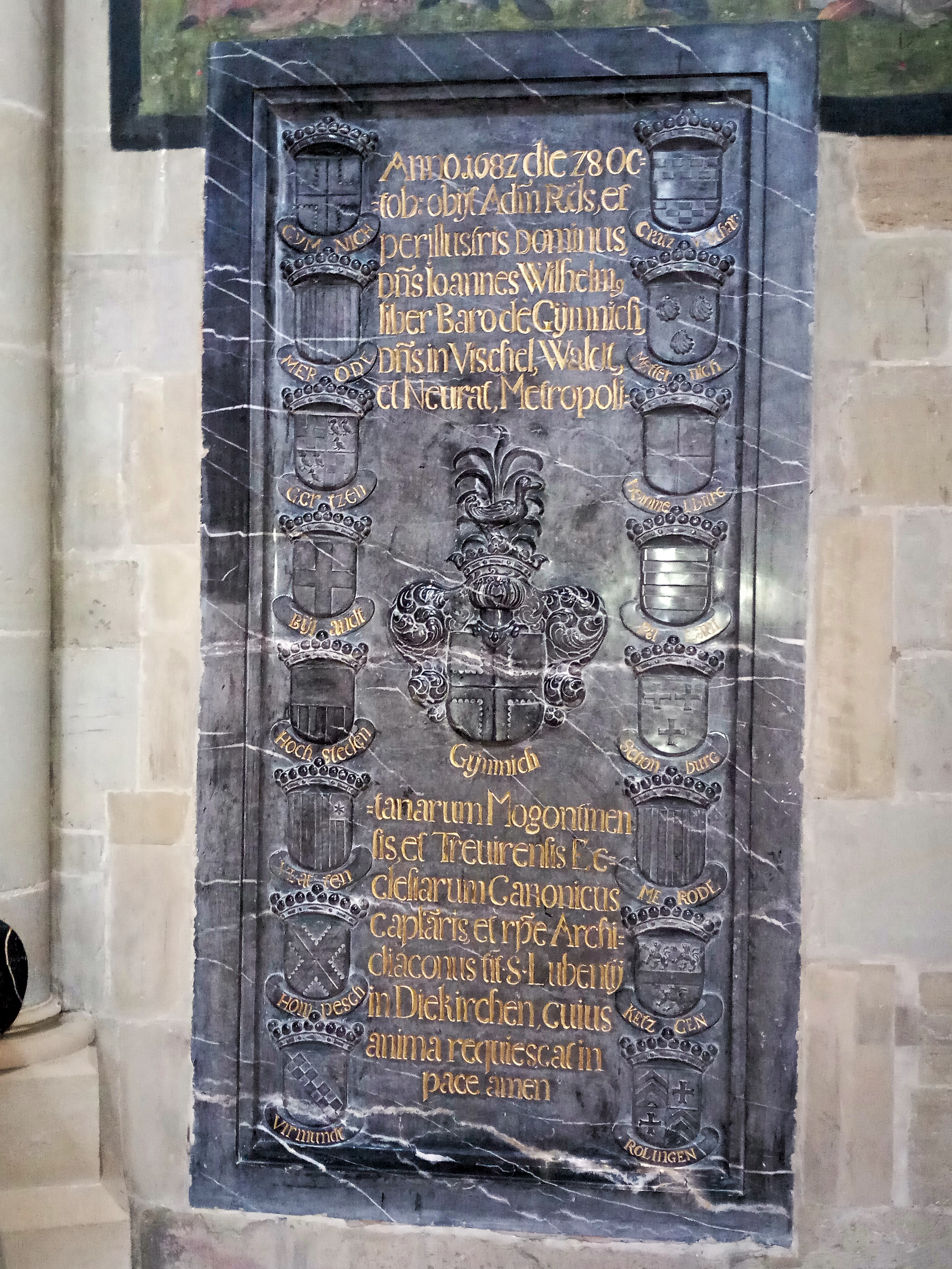 Epitaph des Freiherrn Johann Wilhelm von Gymnich ( † 1682), Liebfrauenkirche Trier